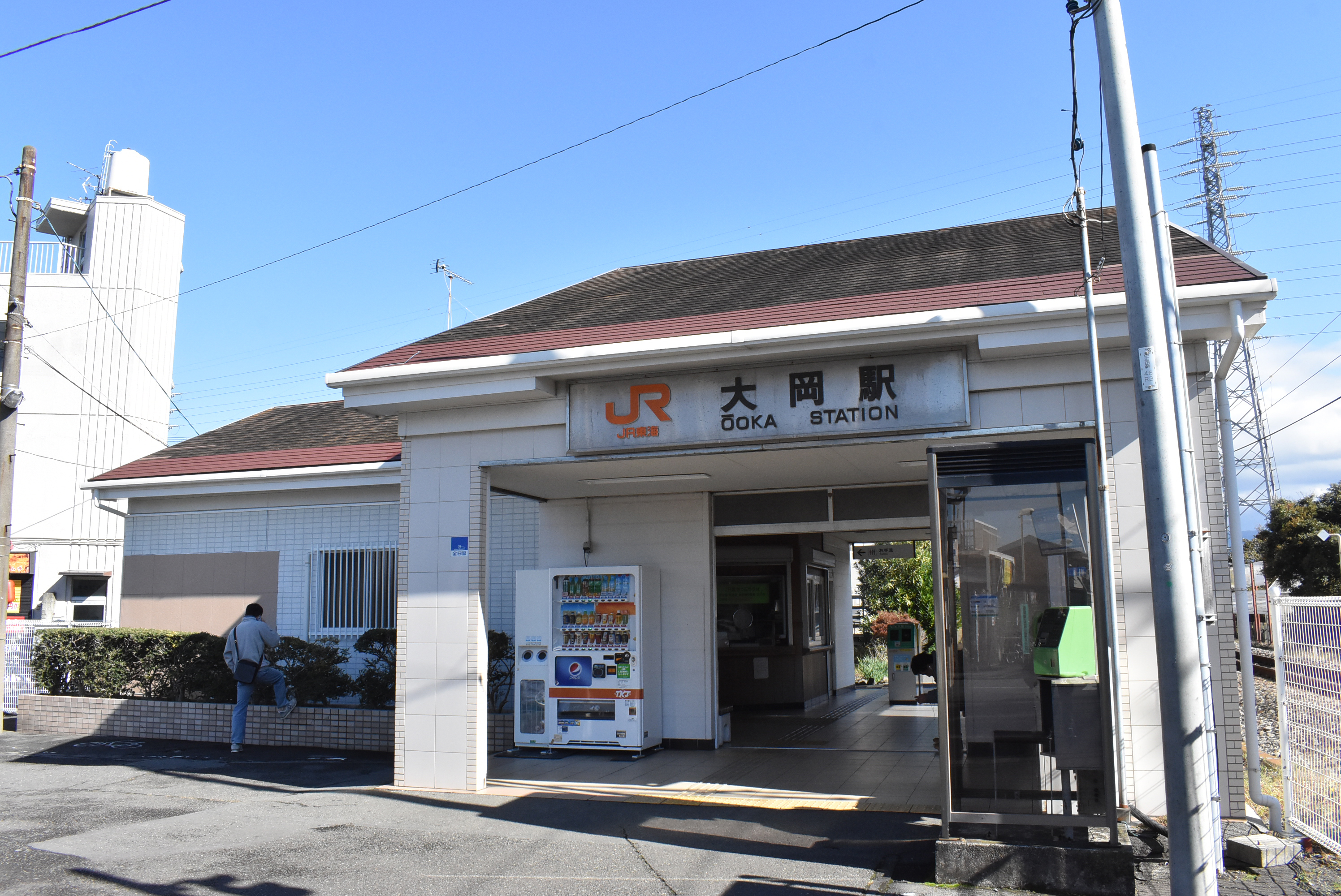 JR東海御殿場線、大岡駅の駅舎です。